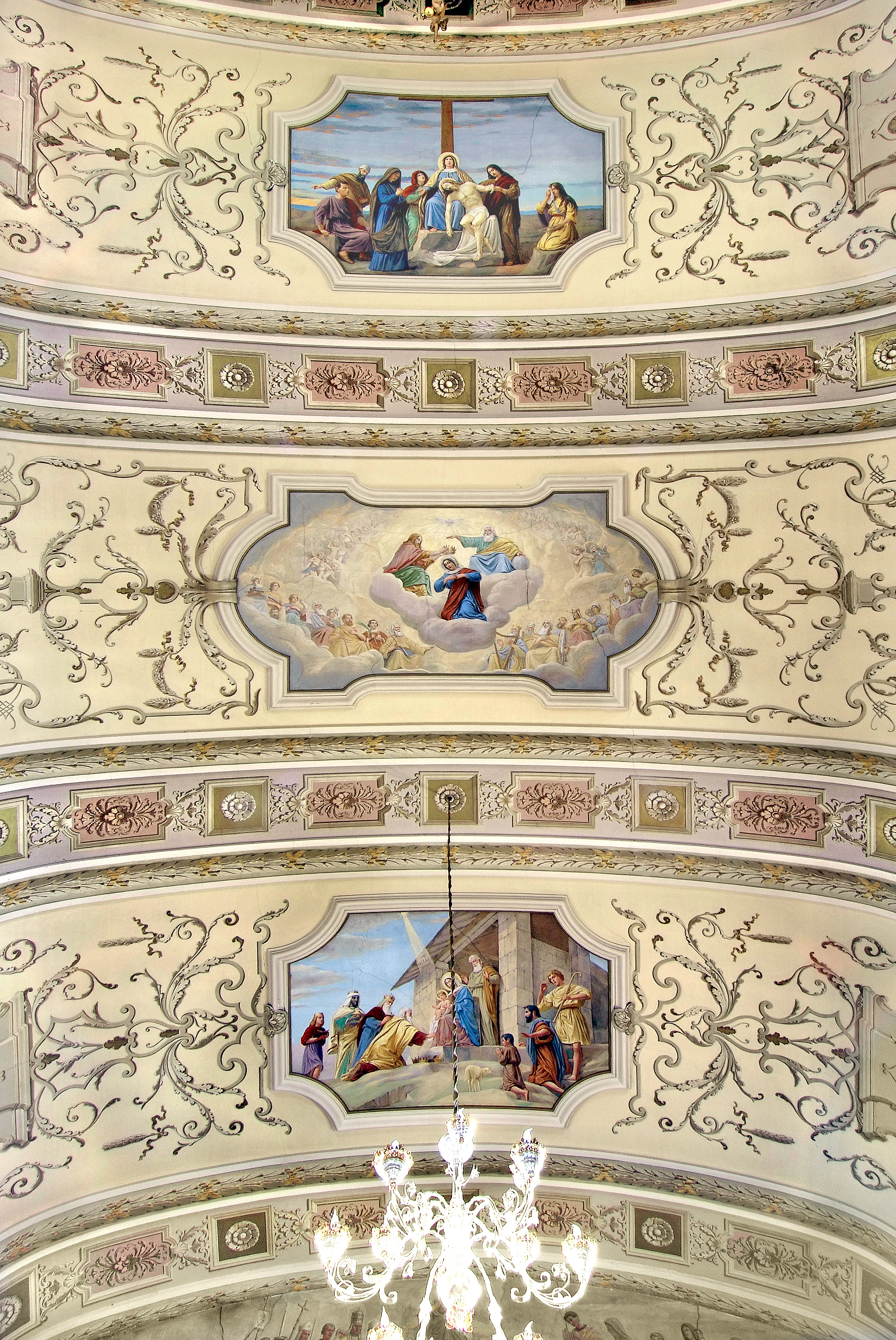 Decorazione